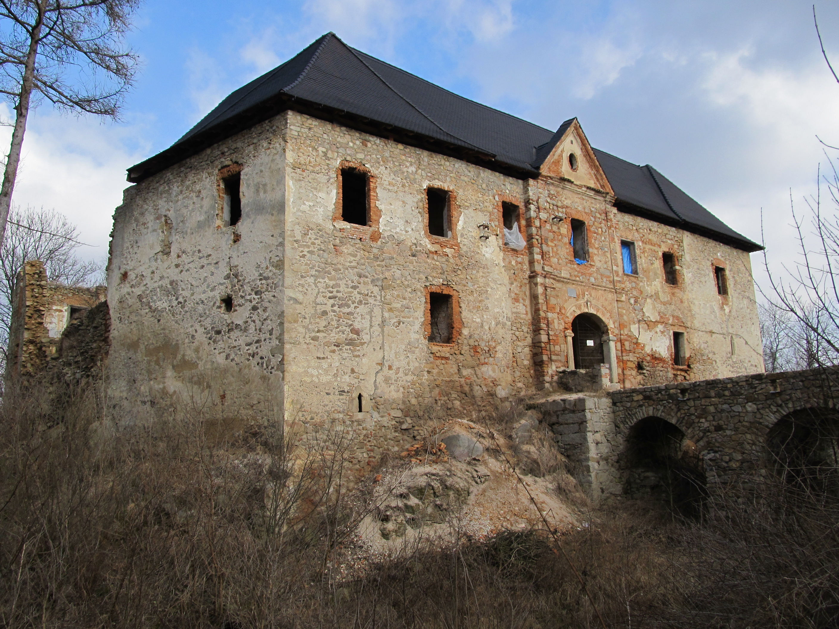 Hrad Kopec